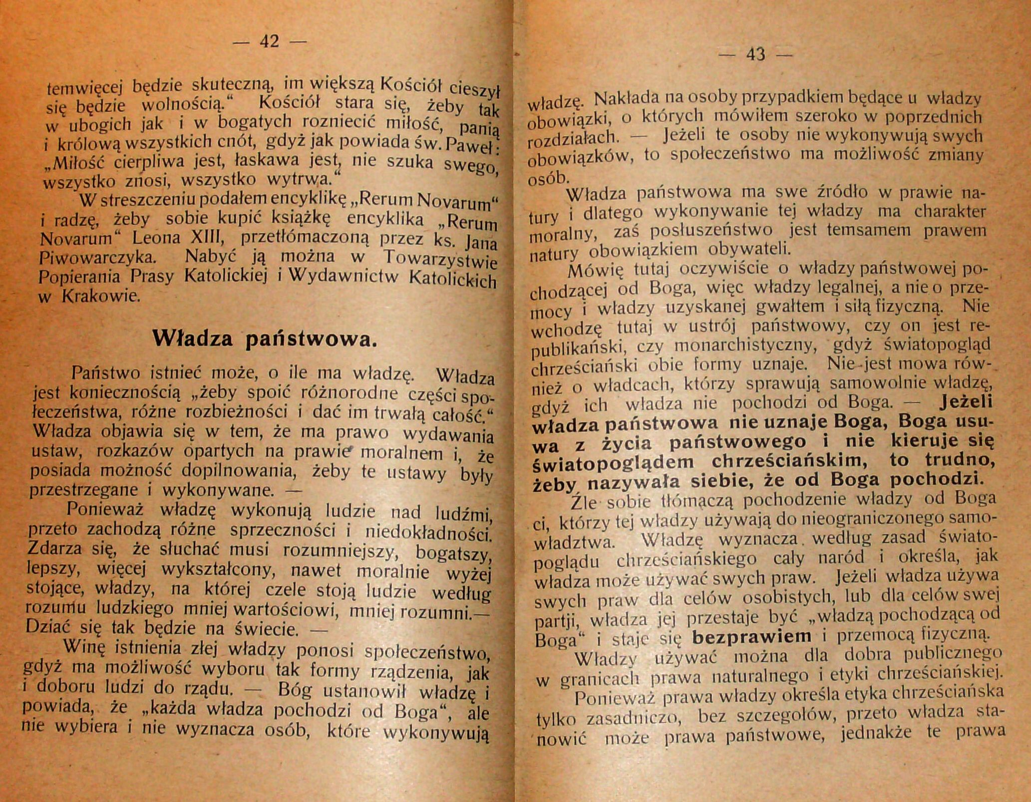 Stanisław Krzyżowski, Rozmyślania w czterdziestą rocznicę encykliki „Rerum novarum”, wydanej 15 maja 1891 r. przez papieża Leona XIII, Pszczyna 1931